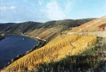 Blck auf die Weinlagen des Bopparder Hamm's